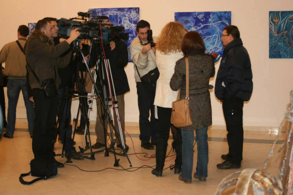 Разговор у Умјетничкој галерији Кристиан Крековић у Фрањевачком самостану Св. Петра и Павла у Тузли. Бранислав Лукић Лука као учесник изложбе и Међународне ликовне колоније "Брешке" (БиХ).